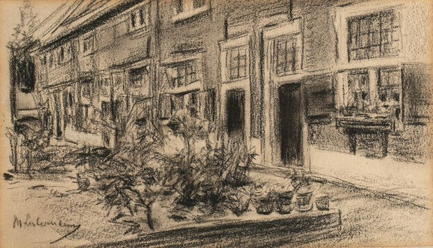 Stevenstift in Leiden, study